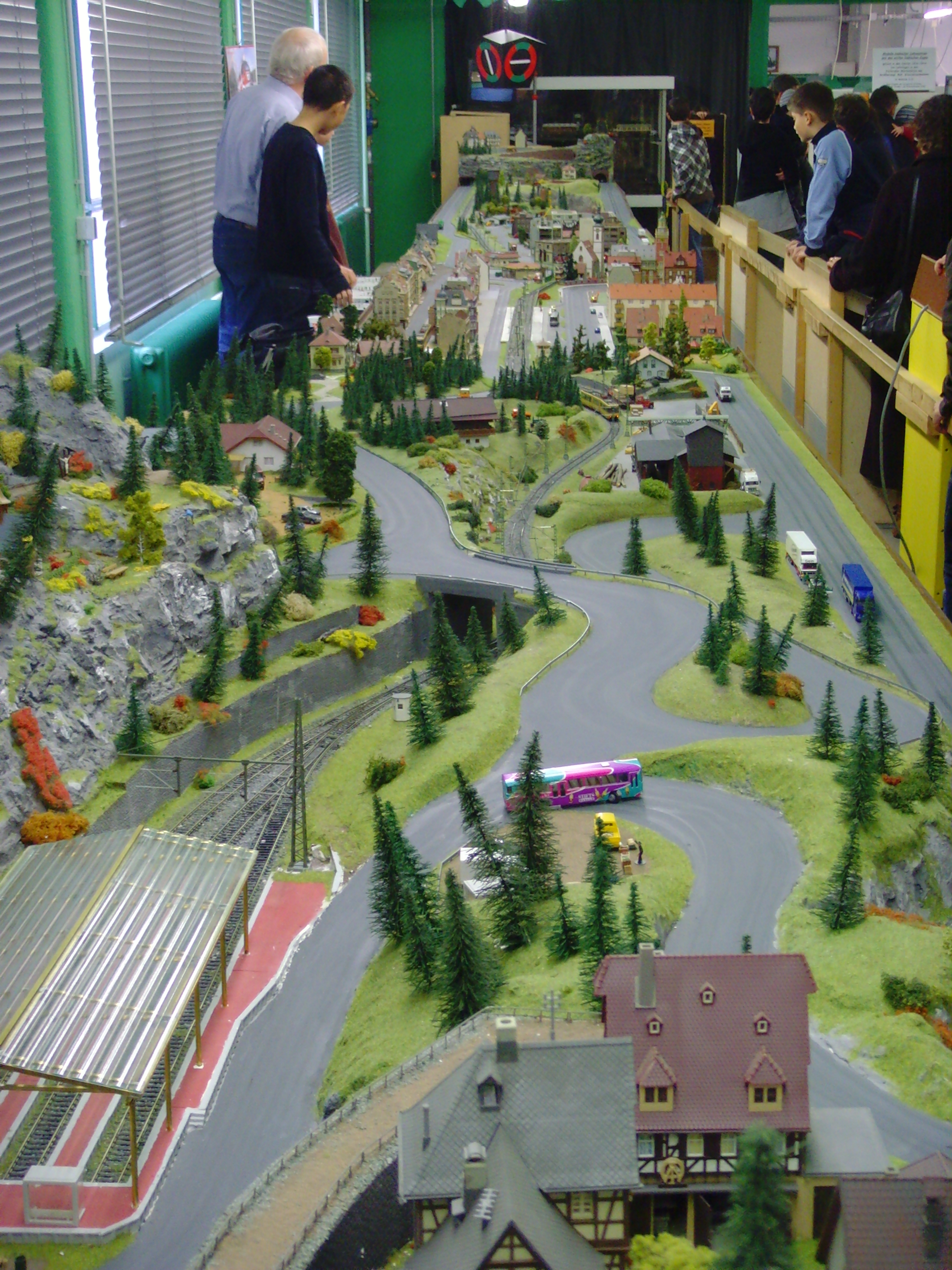 Verkehrsmuseum Karlsruhe 15 Faller Car System